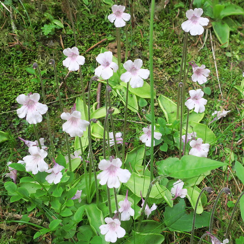 Grassette à grande fleur, sous espèce Rosea - Belledonne (Isère)